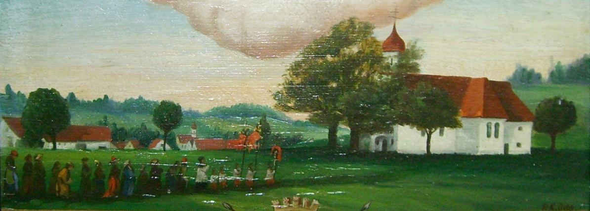 Ausschnitt eines Votivbildes Günzburger Wallfahrerinnen aus dem Jahr 1915 in Heilig Kreuz (Mindelaltheim)